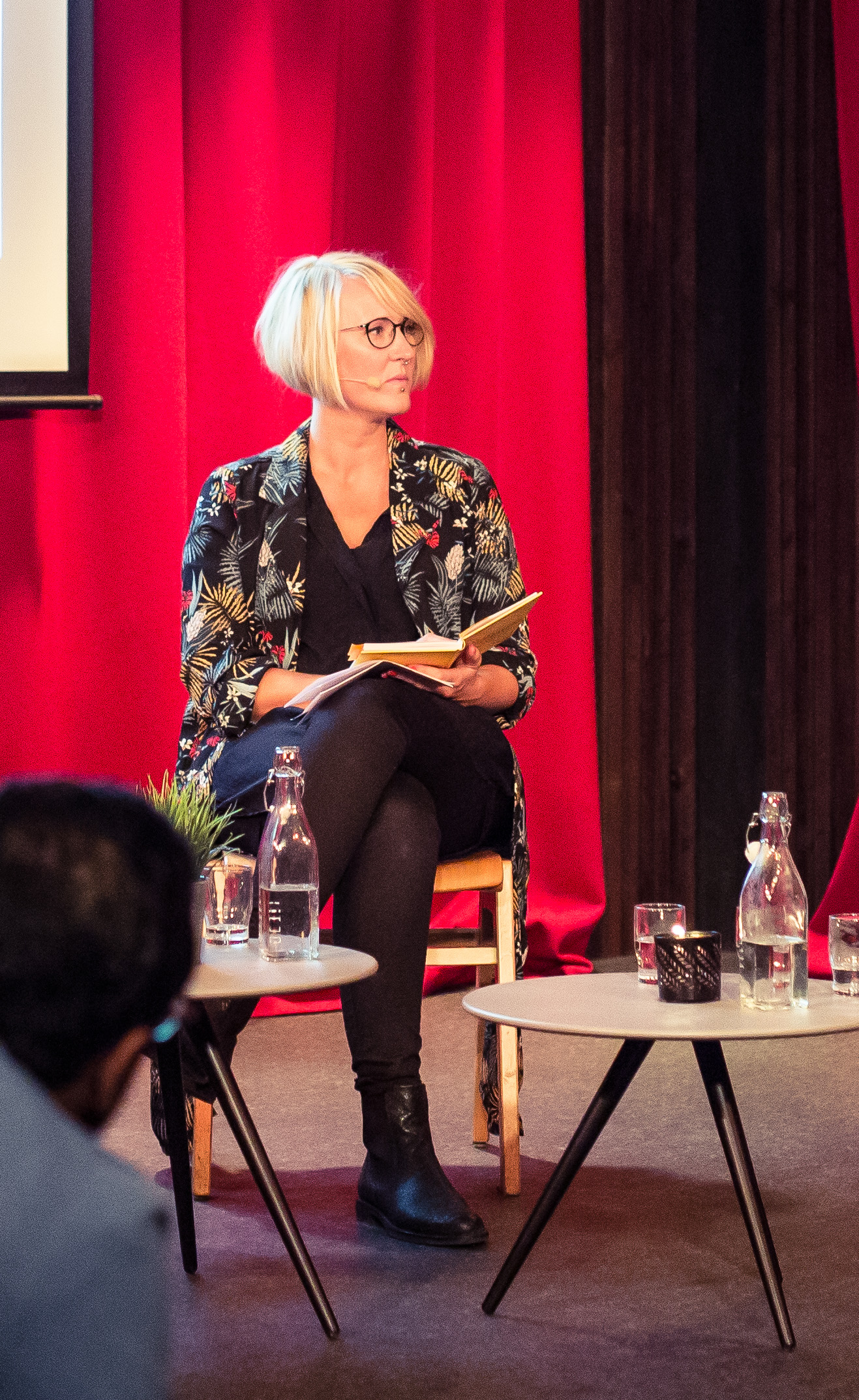 Ellen Reiss, sjefredaktør i Minotenk